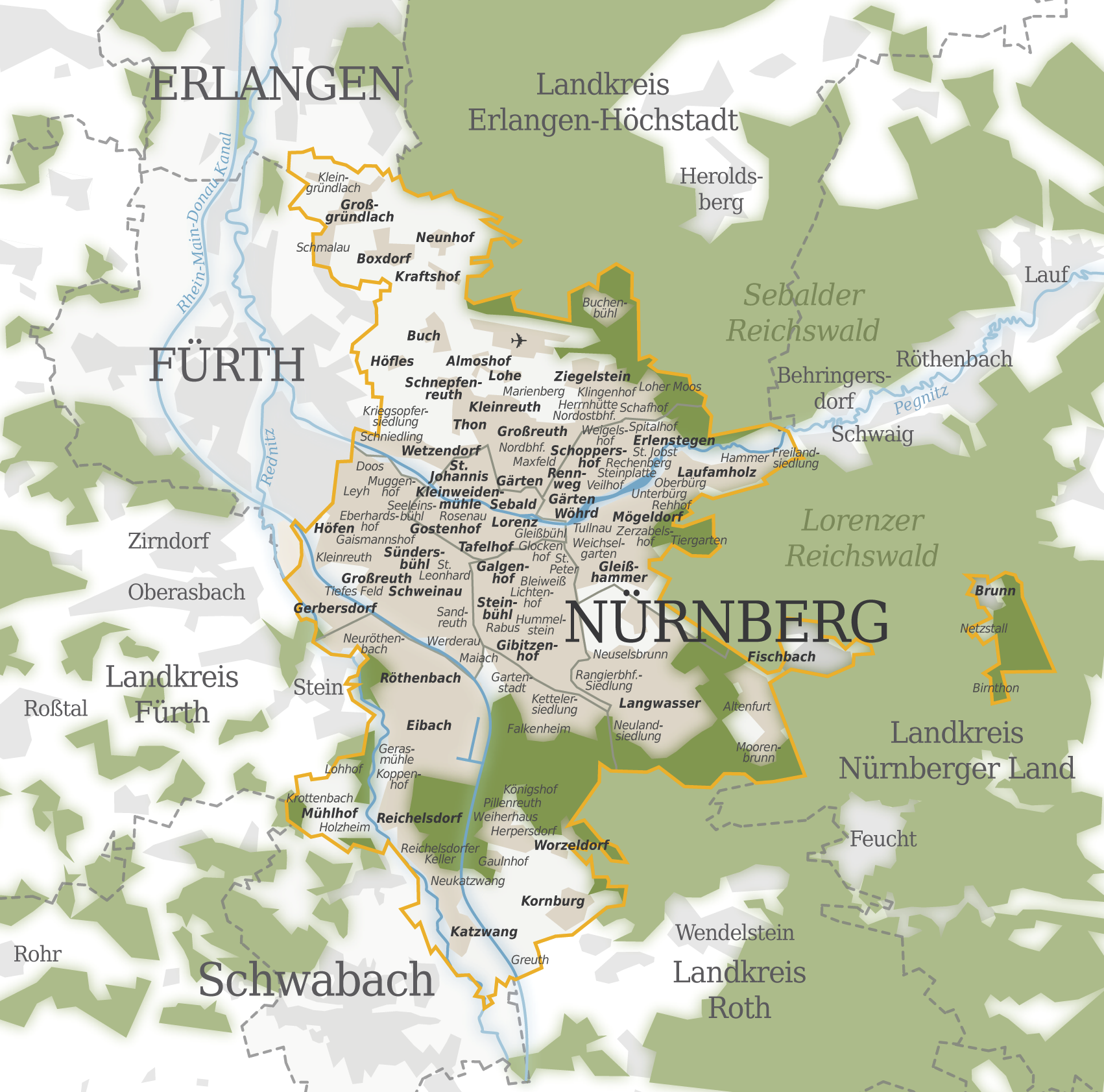 Karte der Nürnberger Stadtteile und Nachbarstädte; Gemarkungen im Stadtgebiet sind hervorgehoben